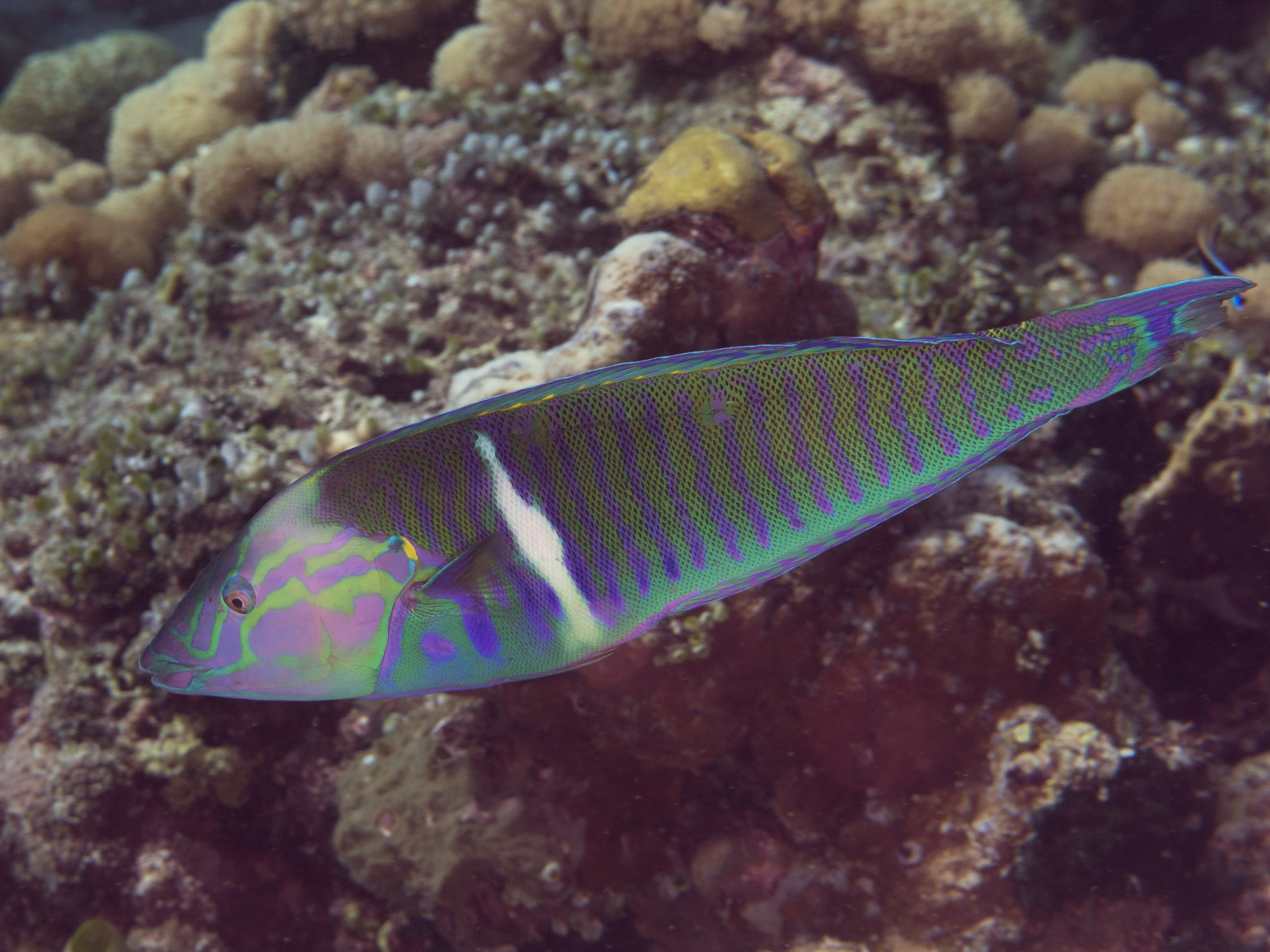 Pastel ringwrasse (Hologymnosus doliatus) - Lembeh, Indonesia